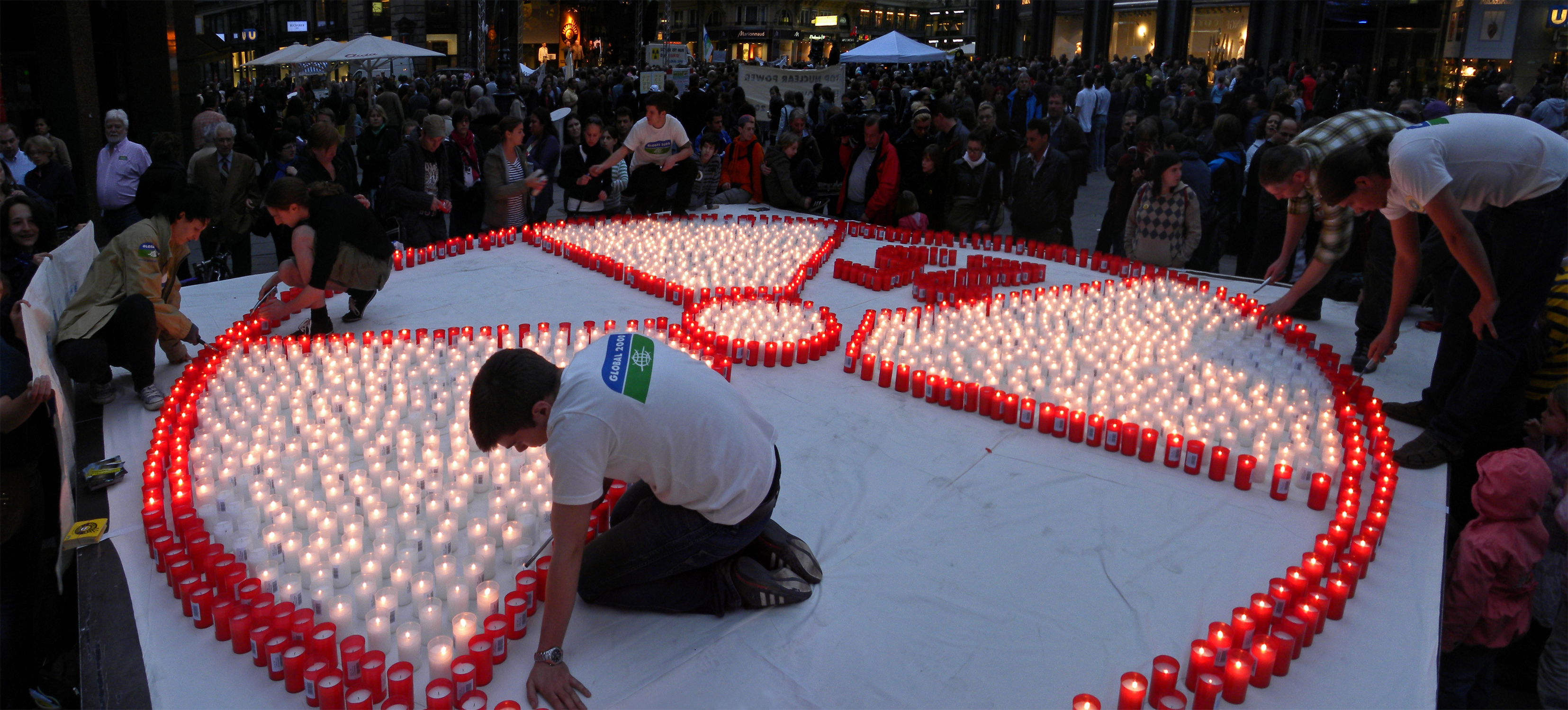 AktivistInnen von Global 2000 bei der Gedenkkundgebung "25 Jahre Tschernobyl" Panorama aus zwei Bildern